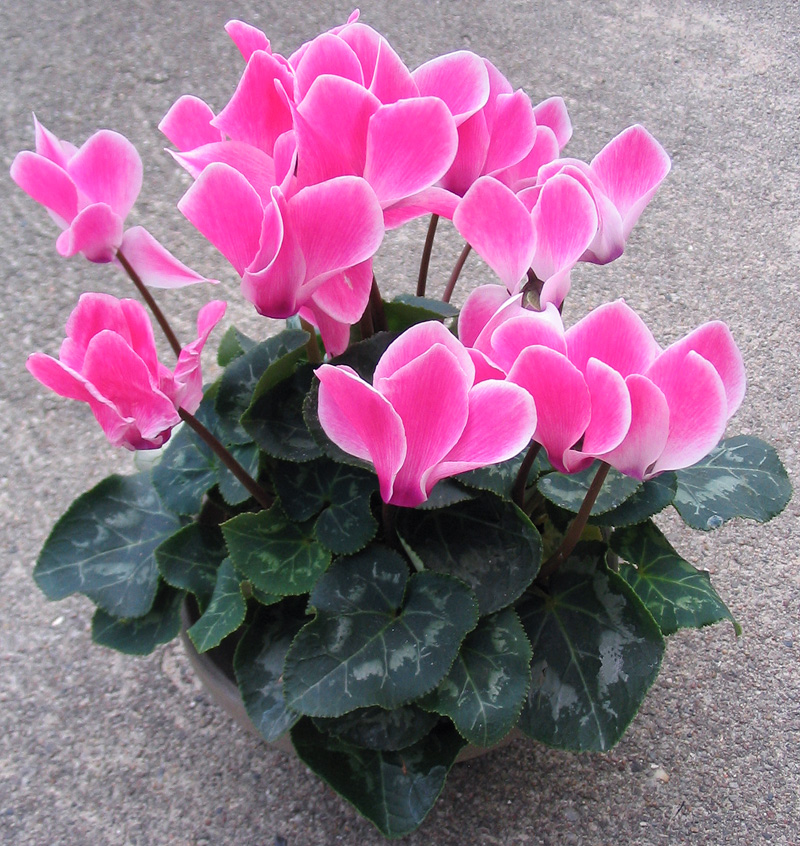 Alpenveilchen (Cyclamen) Siehe auch: Blüte